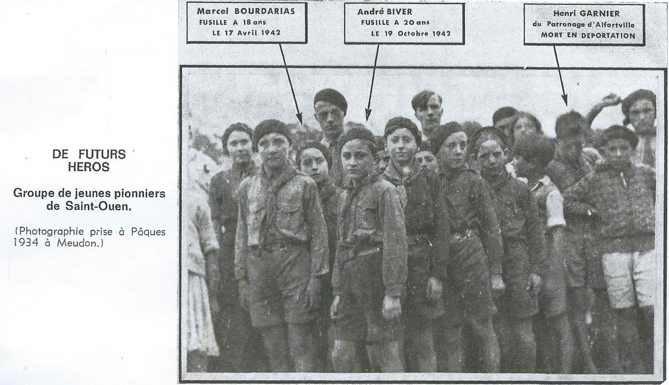 Sur cette photo, on peut voir le résistant communiste Marcel Bourdarias, fusillé le 17.04.1942, enfant en 1934 avec le groupe de Pionniers de Saint-Ouen.